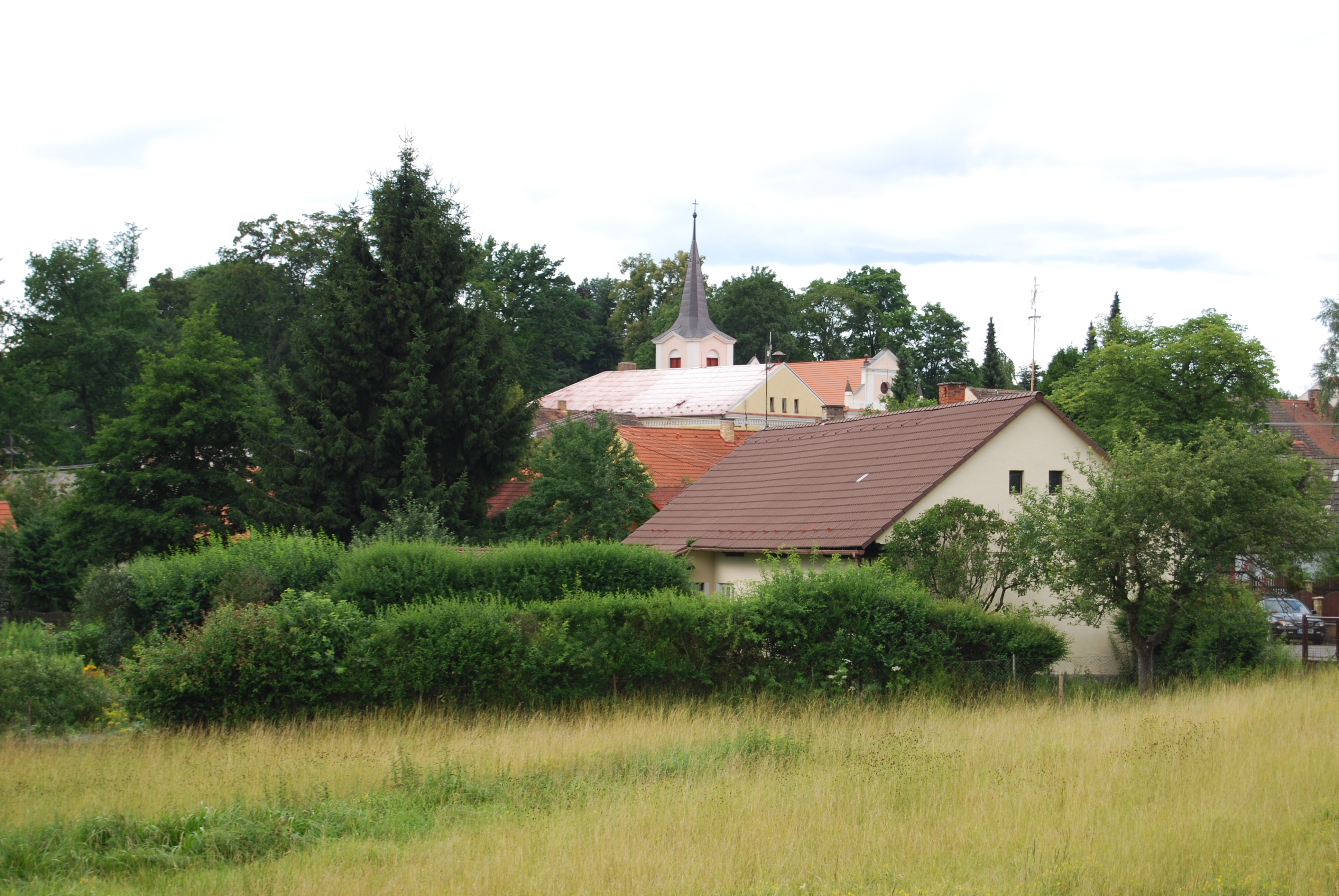 Pohled na obec. Obec Nadějkov v okrese Tábor v Jihočeském kraji. Česká republika.